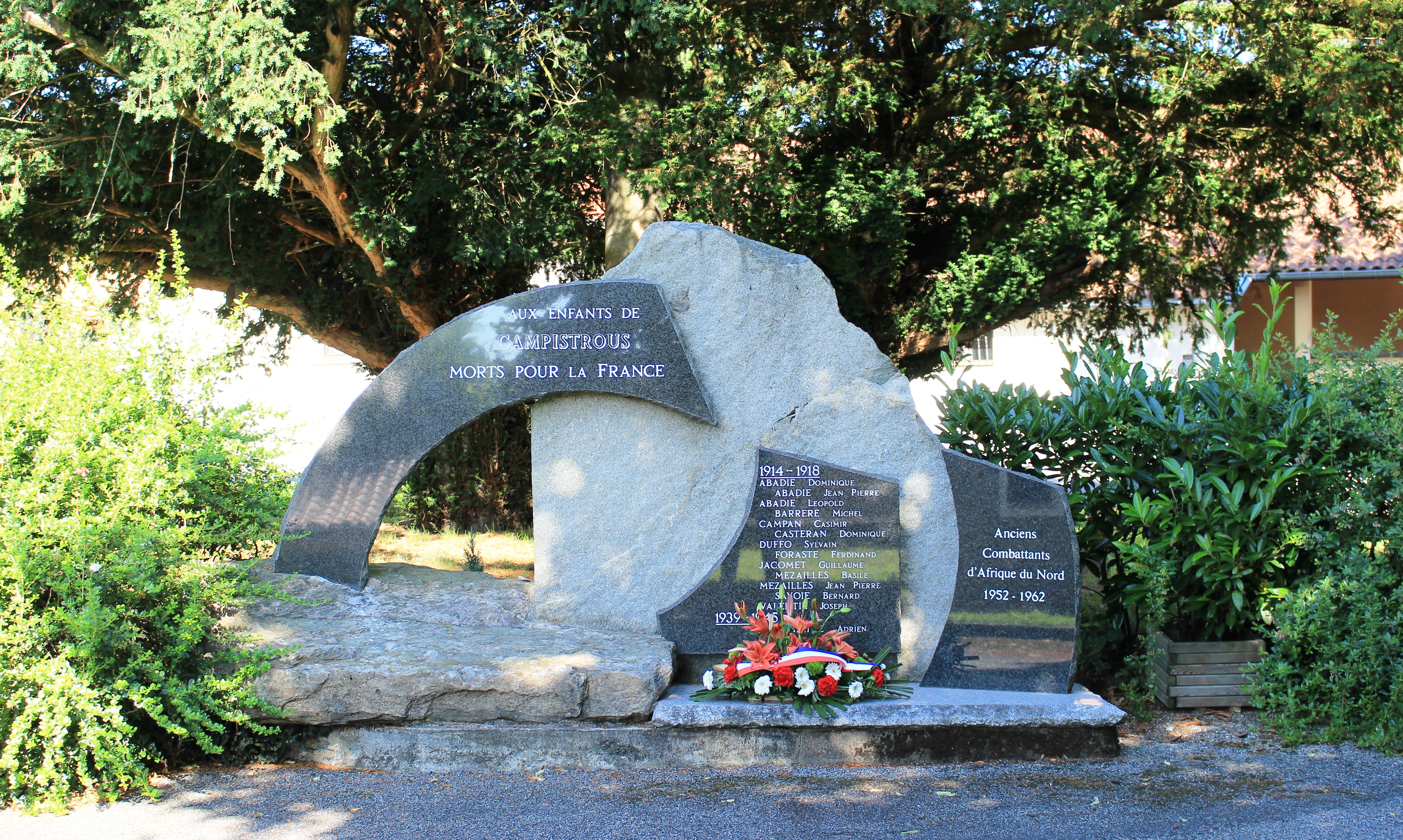 Monument aux morts de Campistrous (Hautes-Pyrénées)